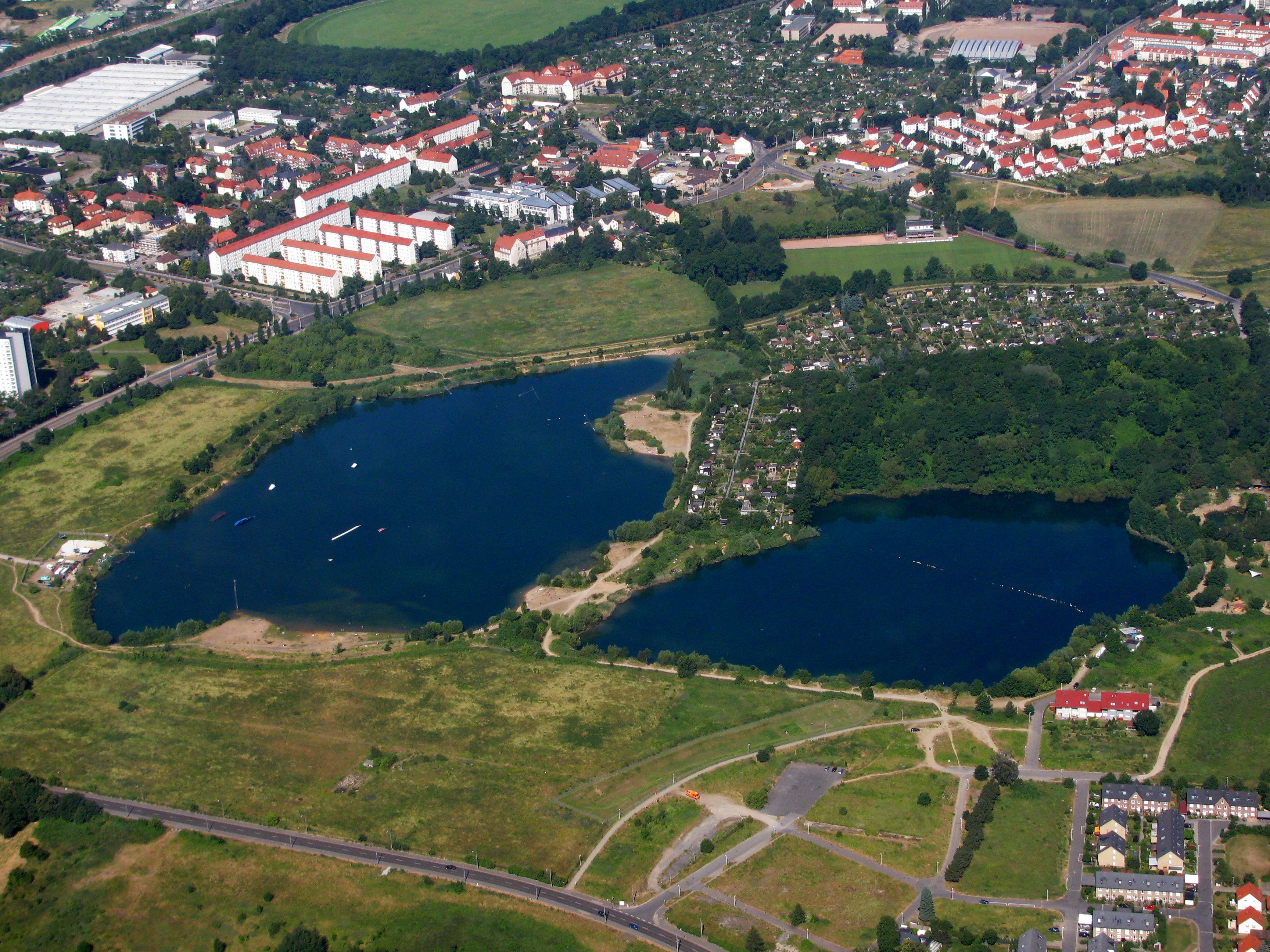 Luftbild Kiessee Dresden-Leuben (rechts bewaldeter Trümmerberg)